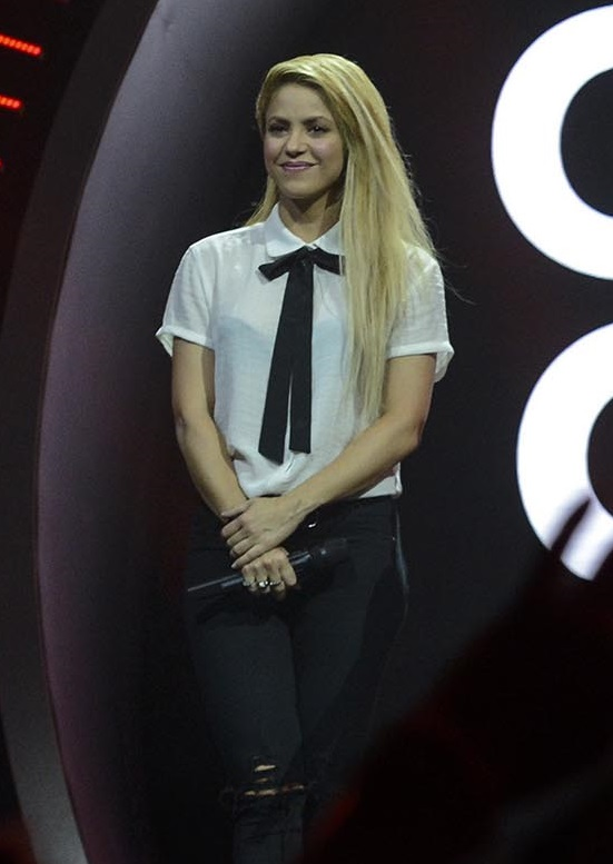 Shakira durante el Globar citizen 2017